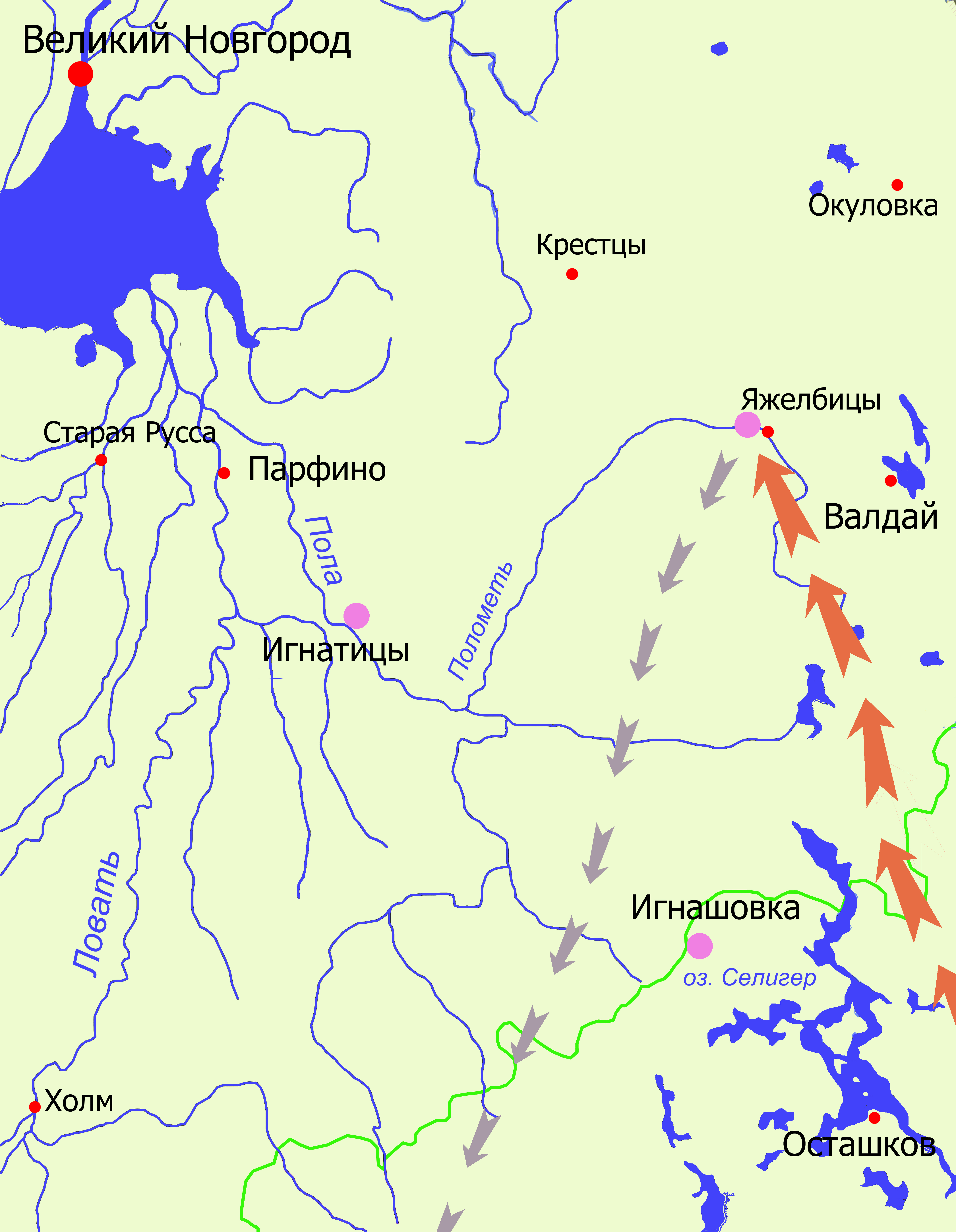 План юго-восточной части Новгородской области.